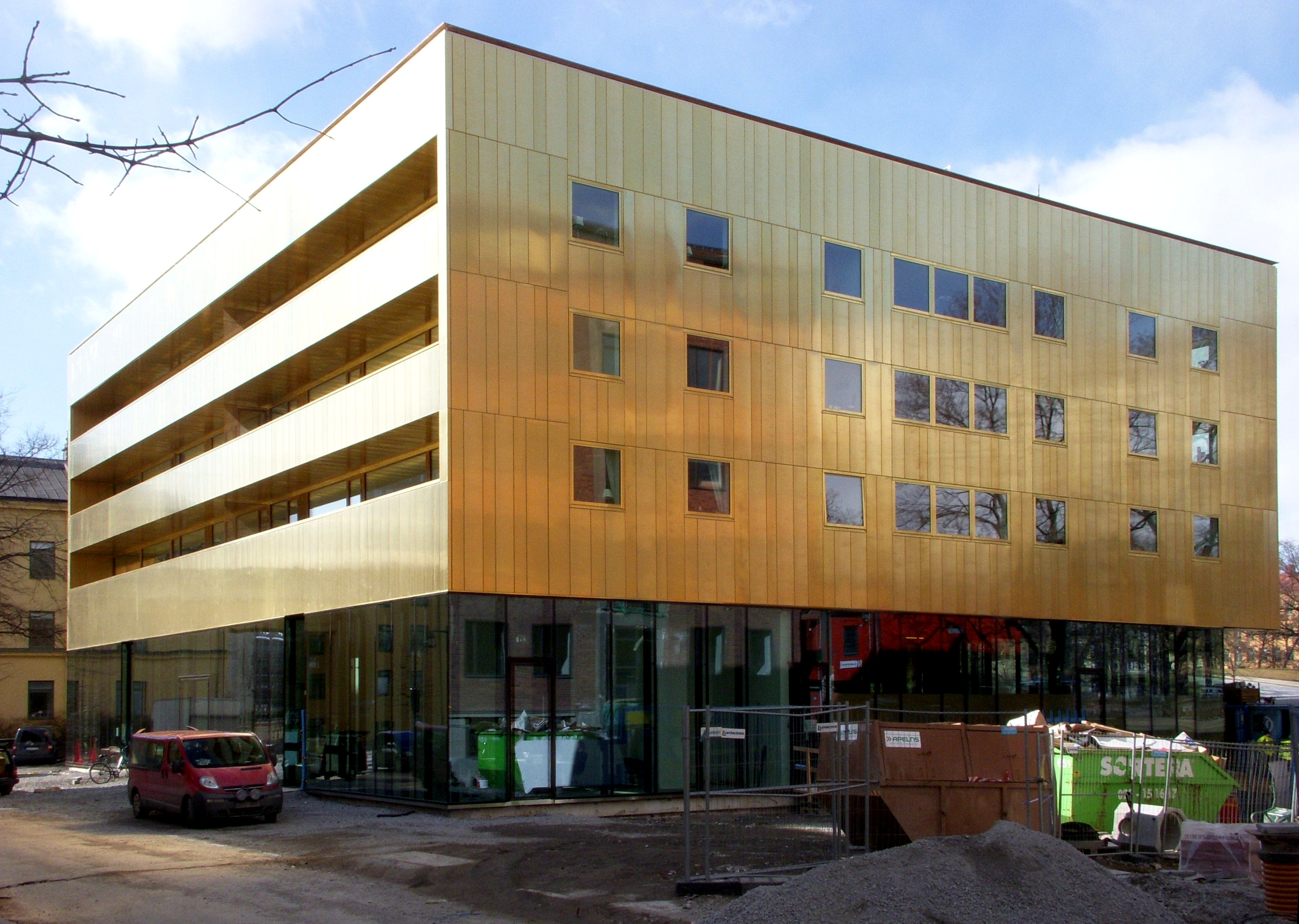 Sven-Harrys konstmuseum, Vasastan, Stockholm